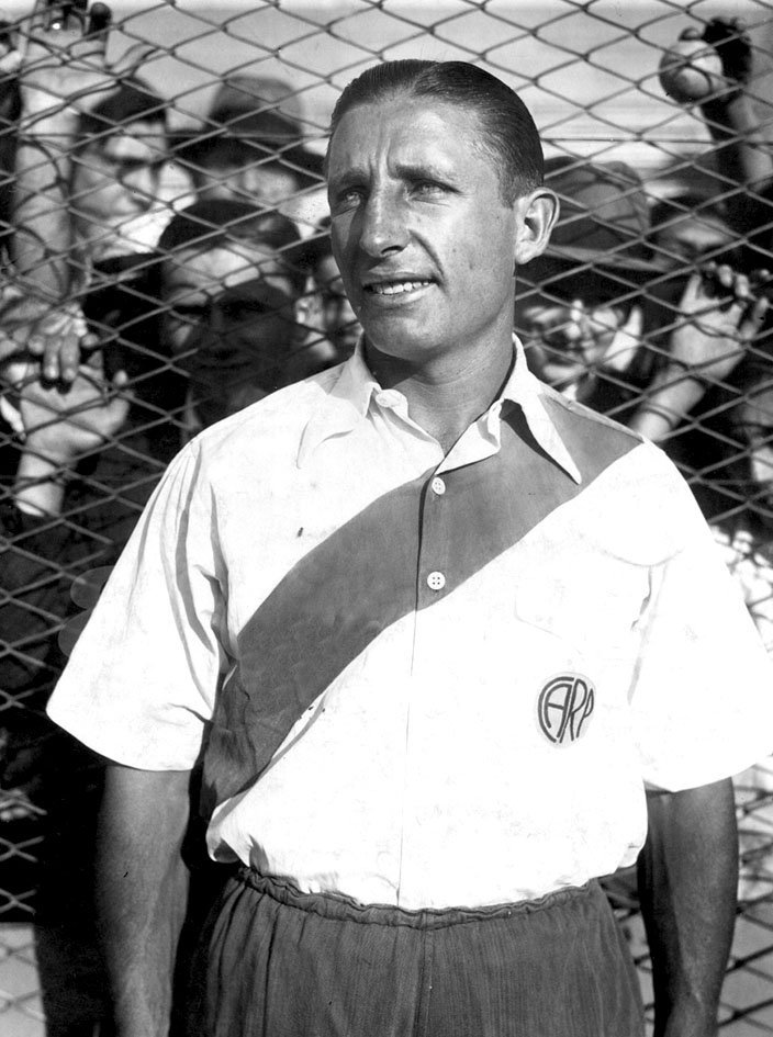 José Maria Minella. Jugador de River Plate en 1937.